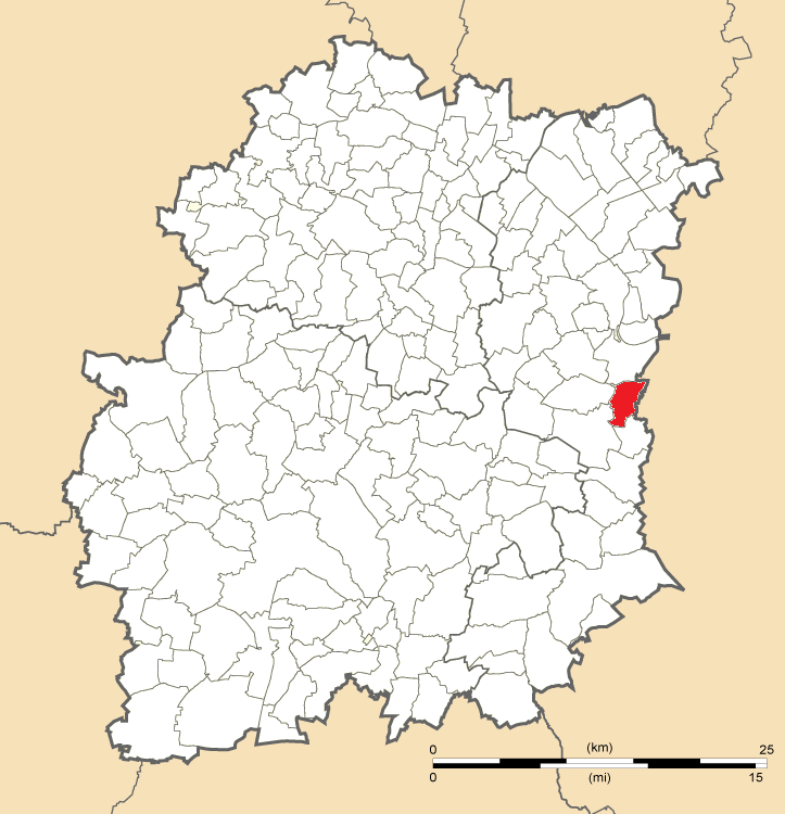 Carte de position d'Auvernaux en Essonne (91)